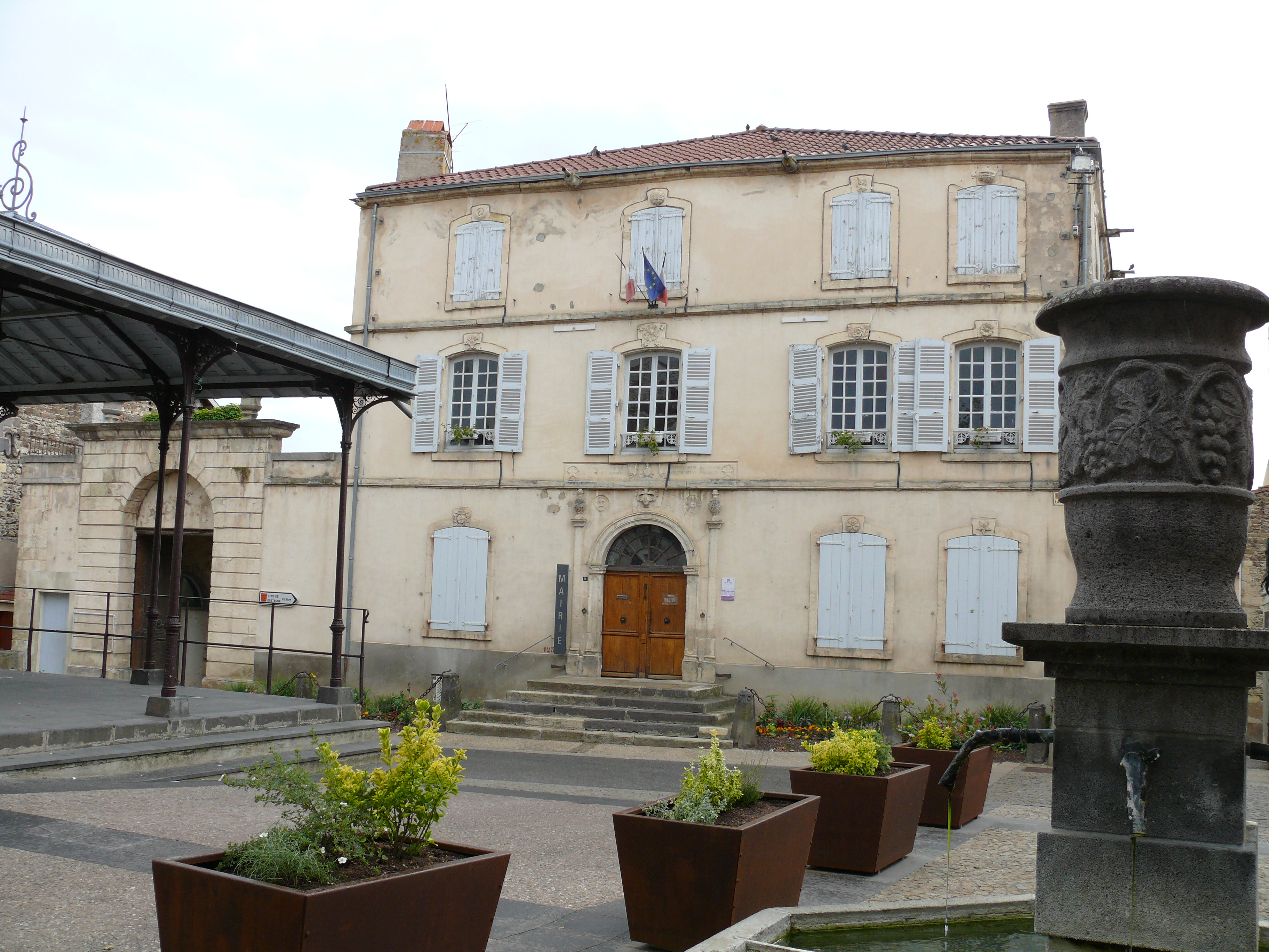 Chauriat, place Lafayette avec la hale et la mairie